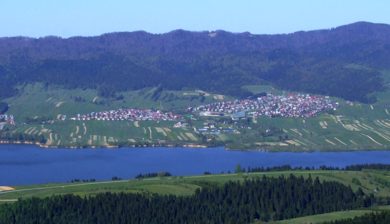 Maniowy nad Jeziorem Czorsztyńskim, widok z Pienin Spiskich